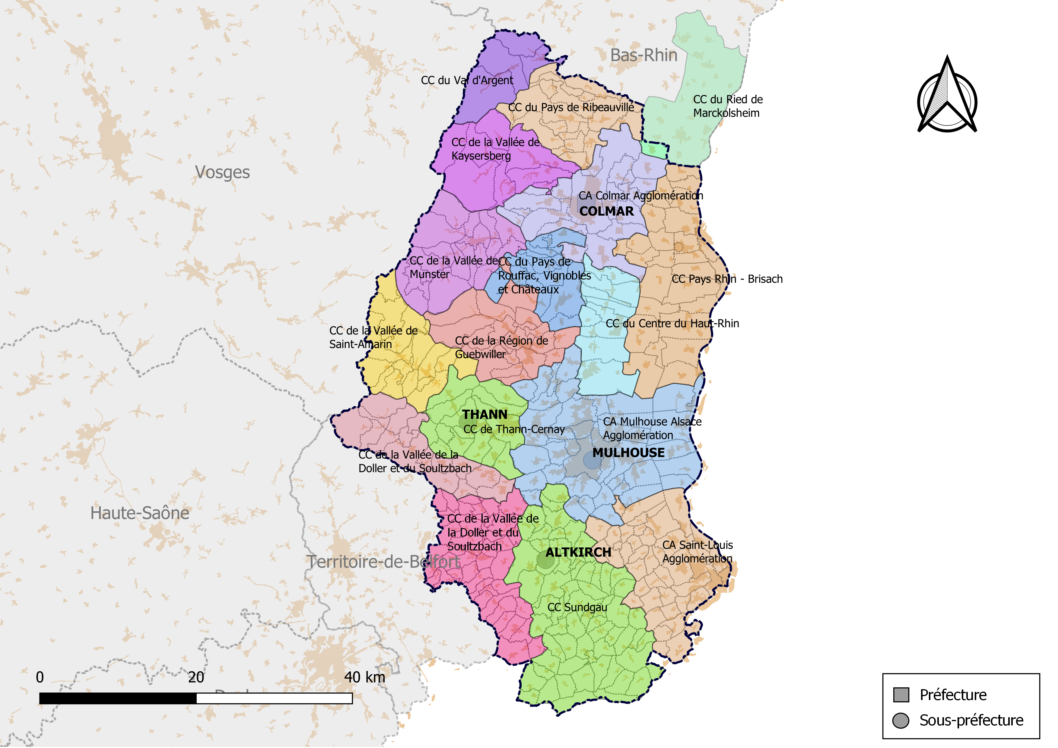 Carte des intercommunalités du département du Haut-Rhin, France. Composition au 1er janvier 2019.